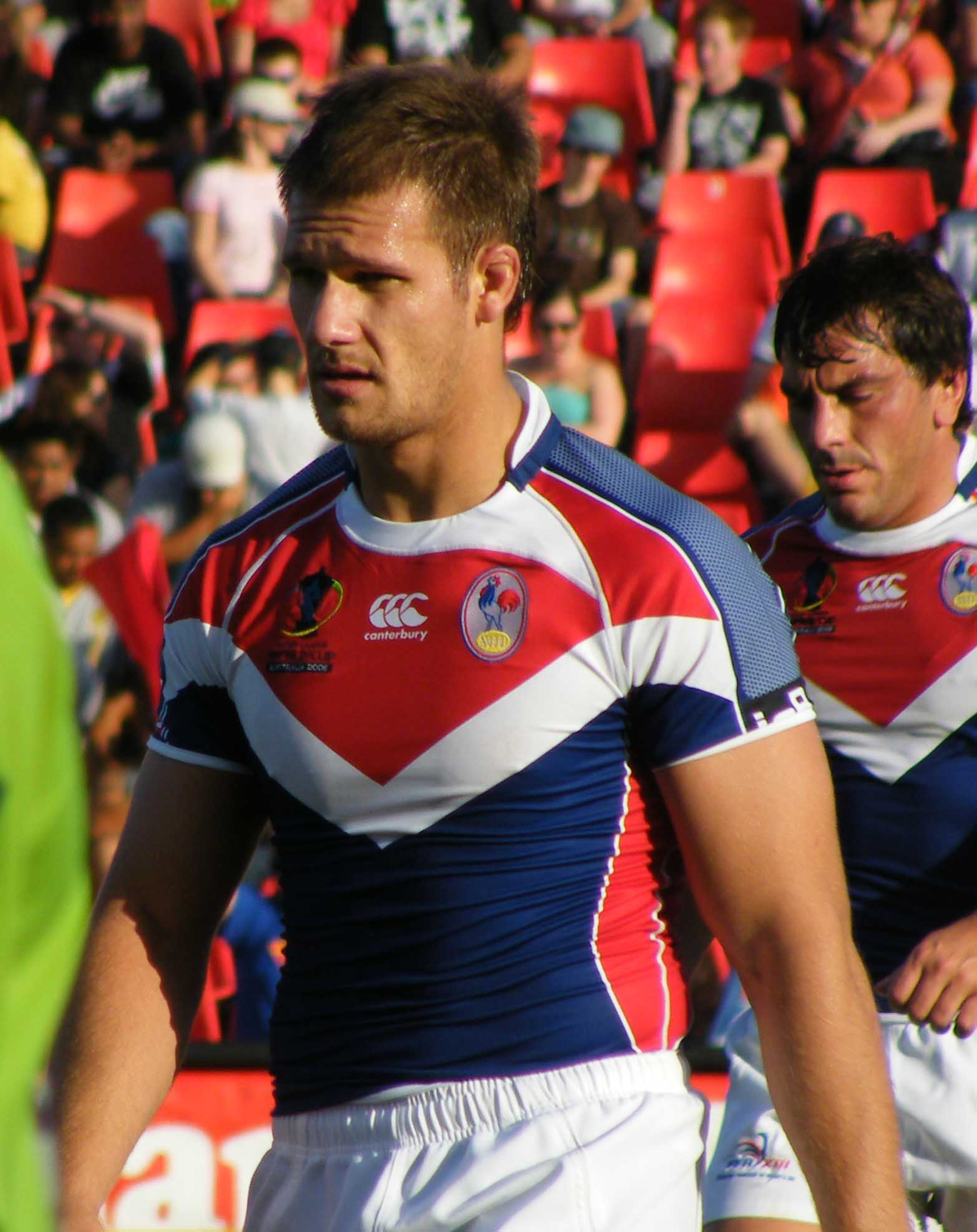 Gregory Mounis, joueur de rugby à XIII français sous le maillot de l'équipe de France.